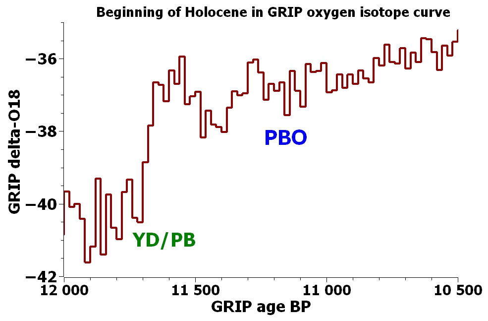 Pre-boreal oscillation, PBO seen in NGRIP delta-O18 data curve.